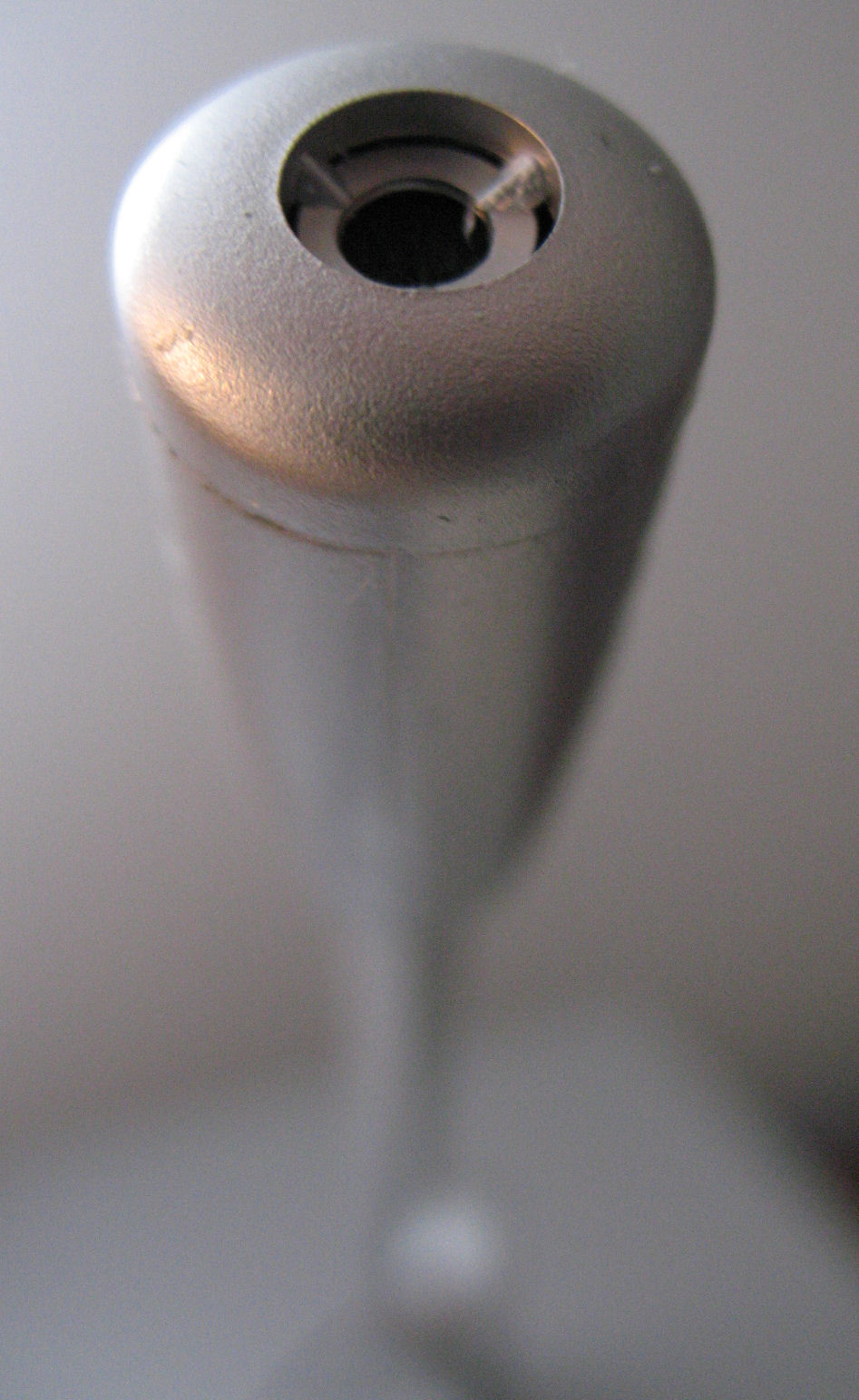 Microphone à électret / Electret microphone